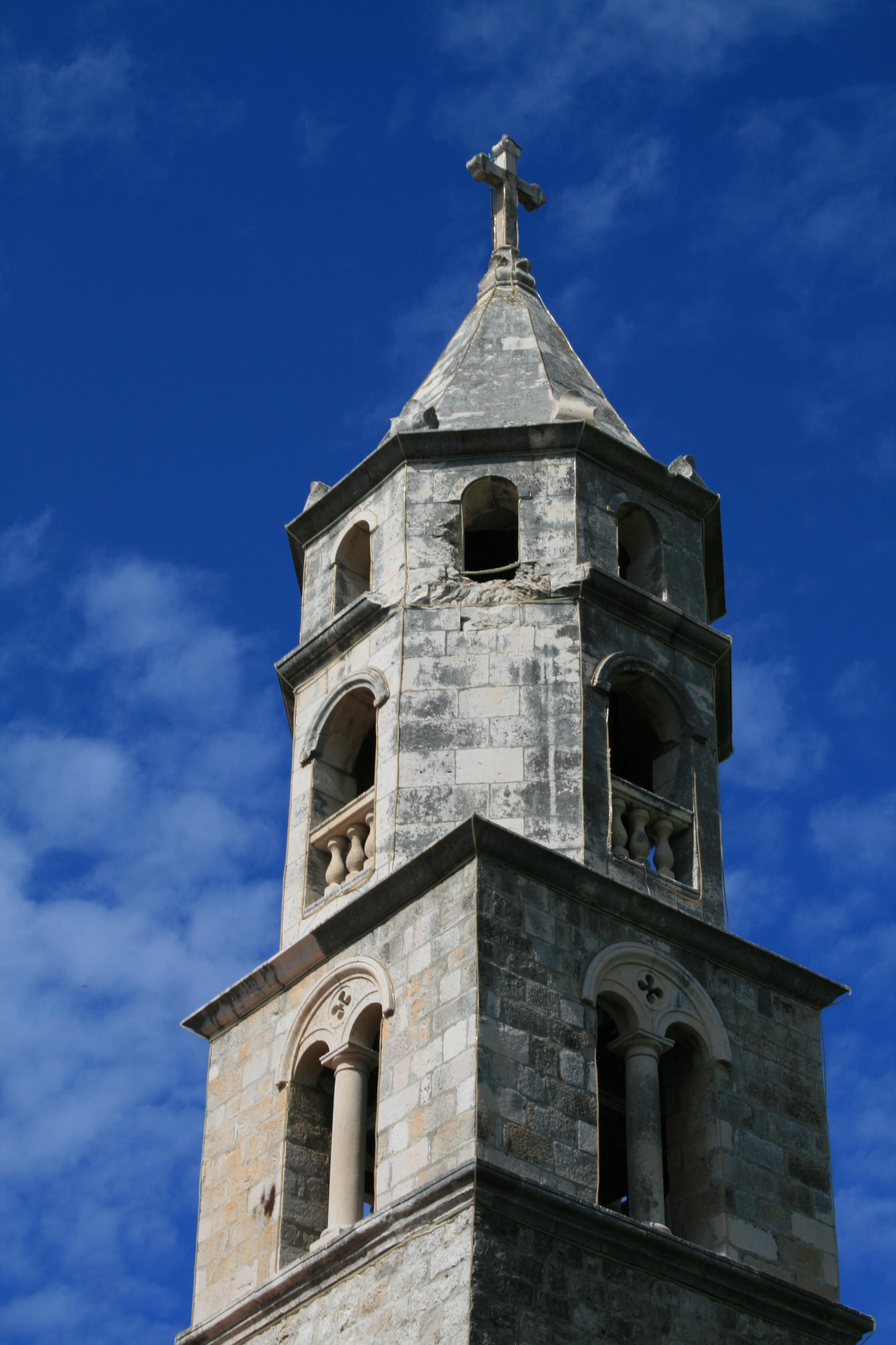 Колокольня церкви Святого Николая в Цавтате, Хорватия